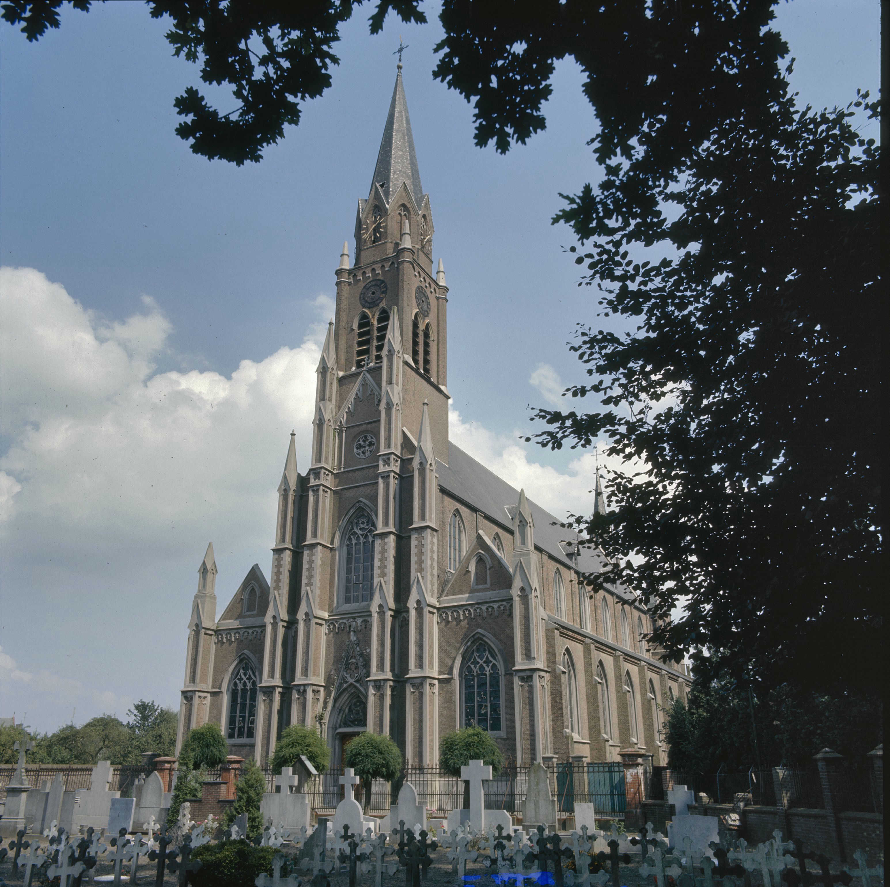 Sint Johanneskerk: Overzicht van de zuid-westgevel met neogotische kerktoren